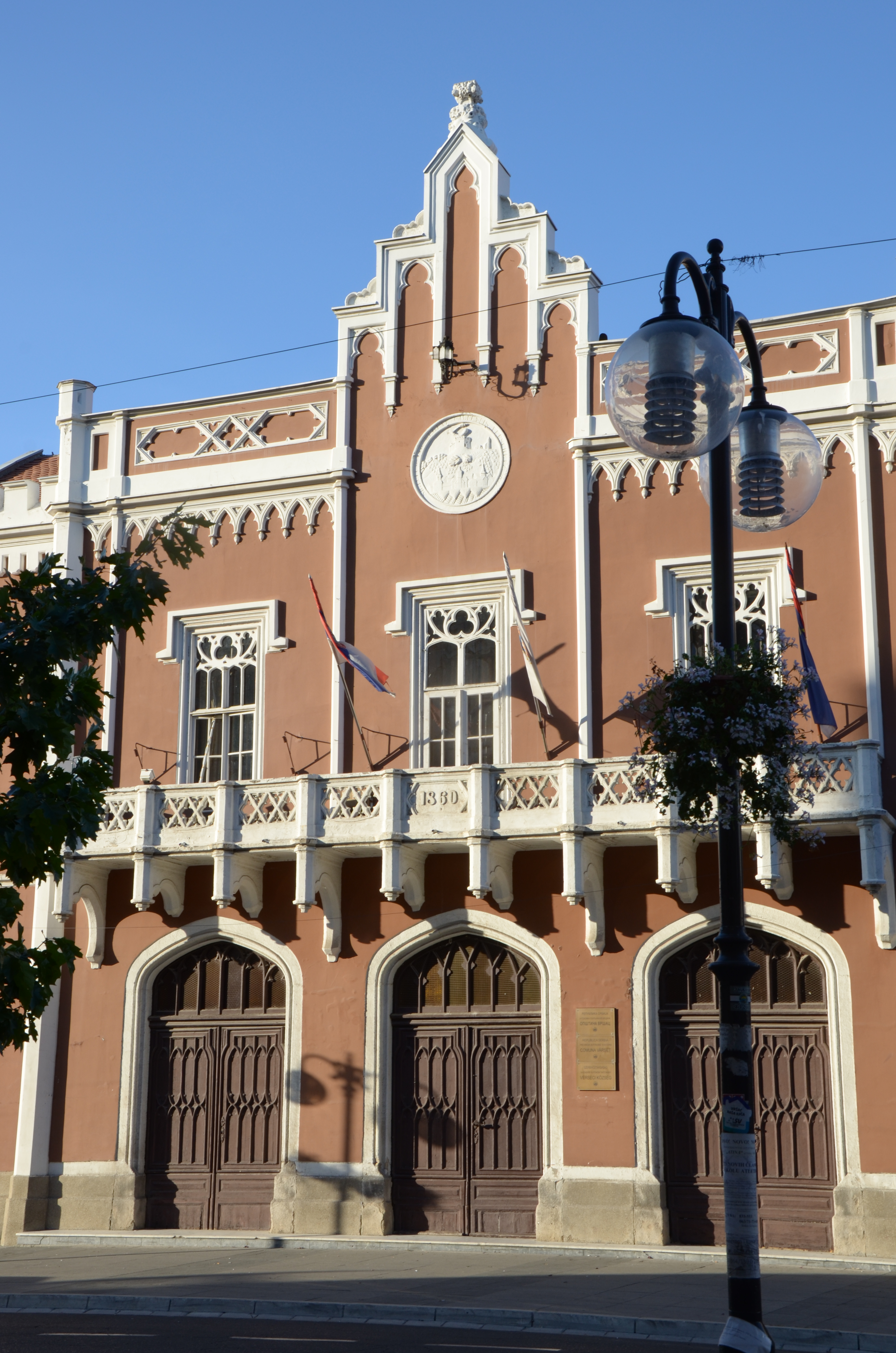 Gradska kuća u Vršcu, Trg pobede 1